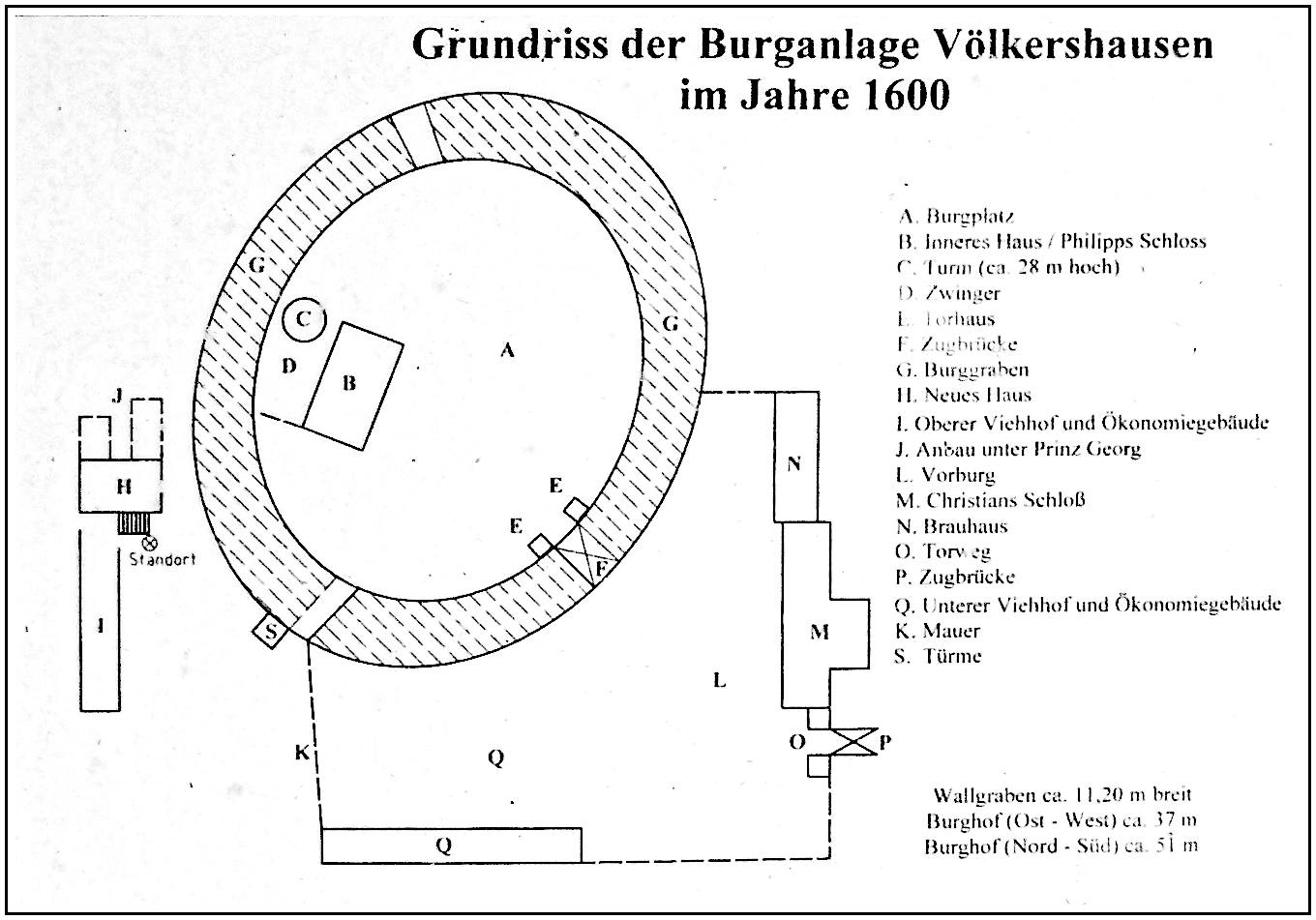 Schautafel zur Ortsgeschichte vor der Schule in Vökershausen.